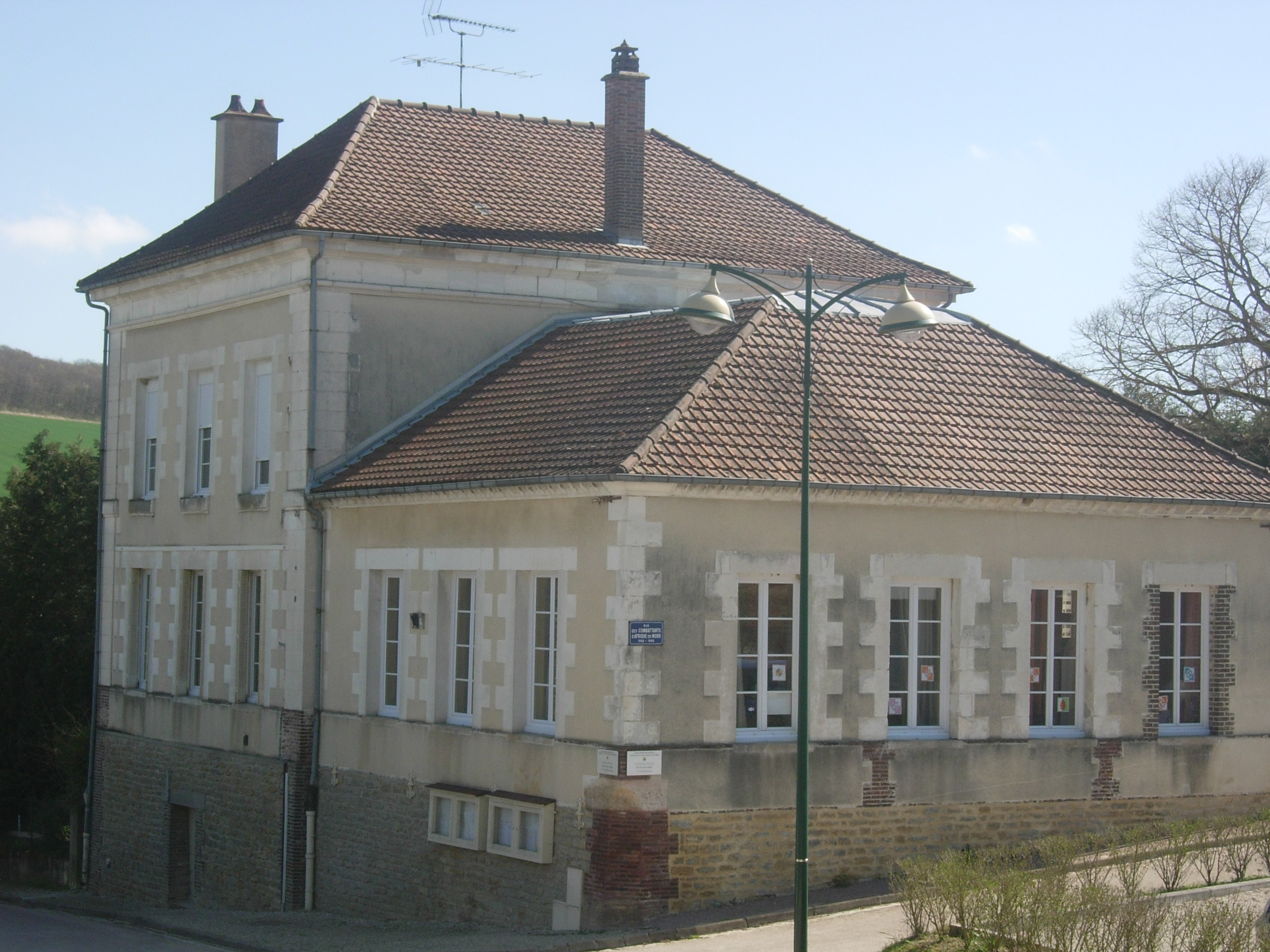 Mairie de Bucey-en-Othe (Aube)